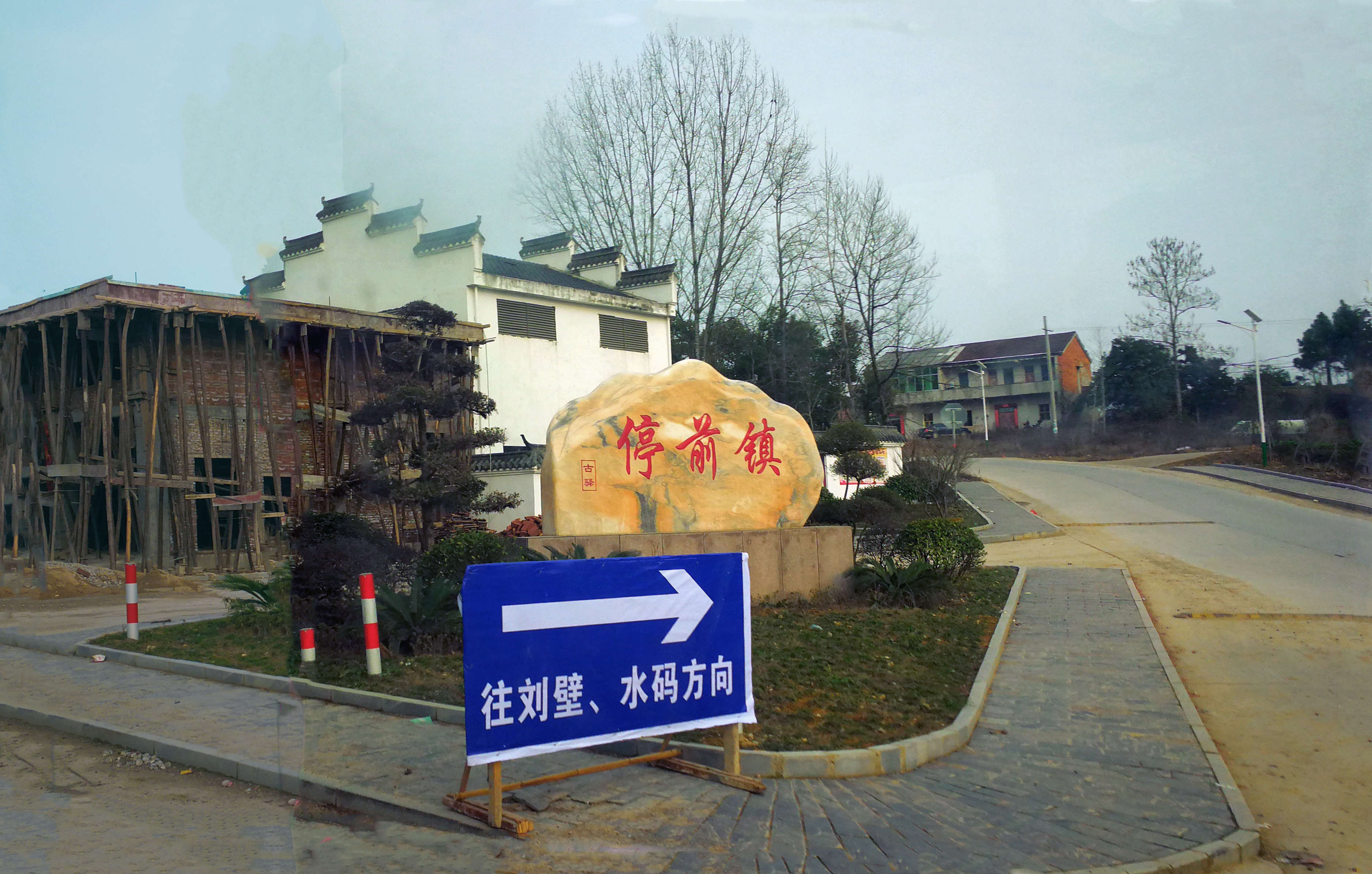 中文（中国大陆）: 中国湖北省黄梅县停前镇